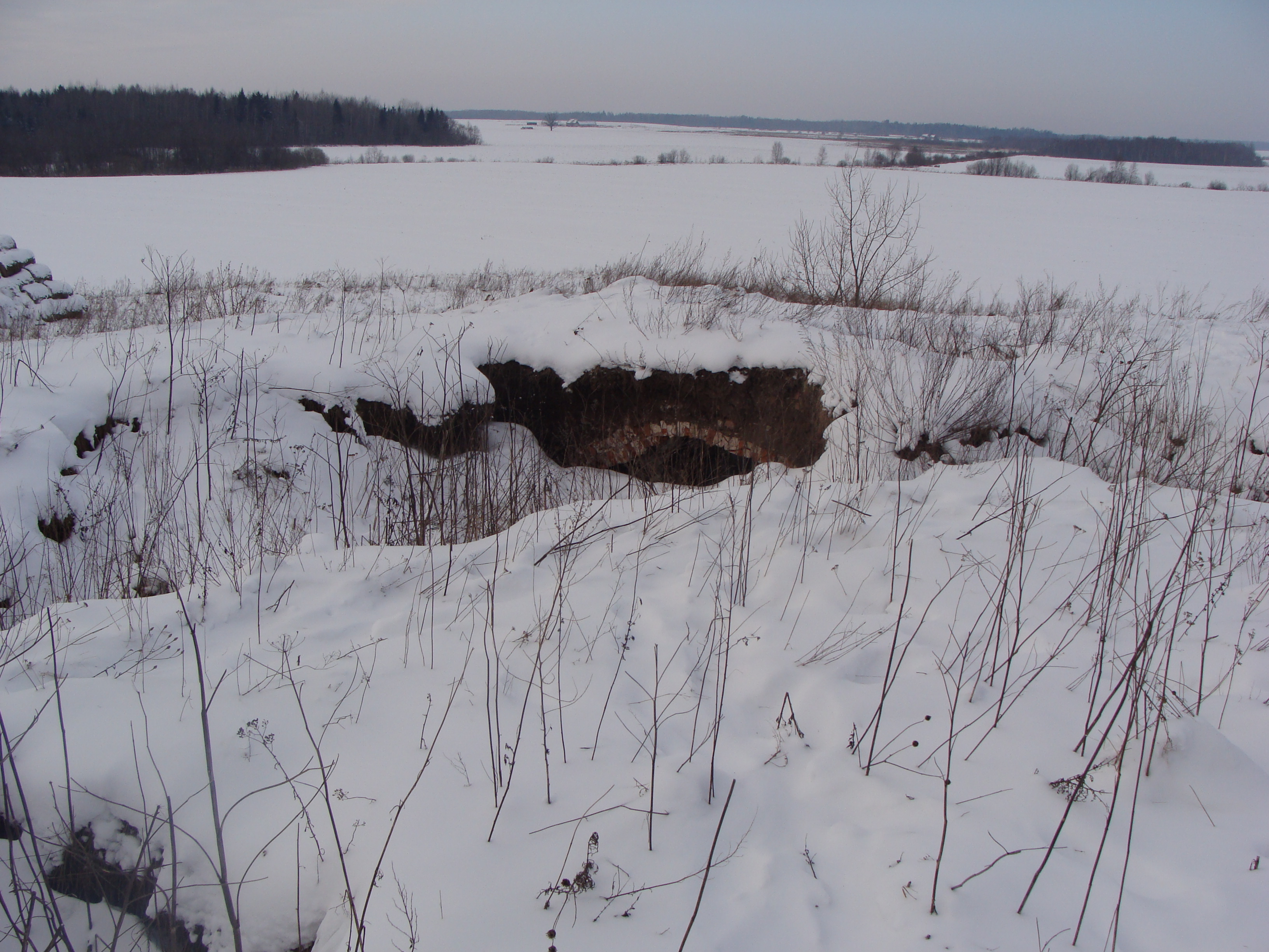 Dvaro rūsio likučiai 2012m.